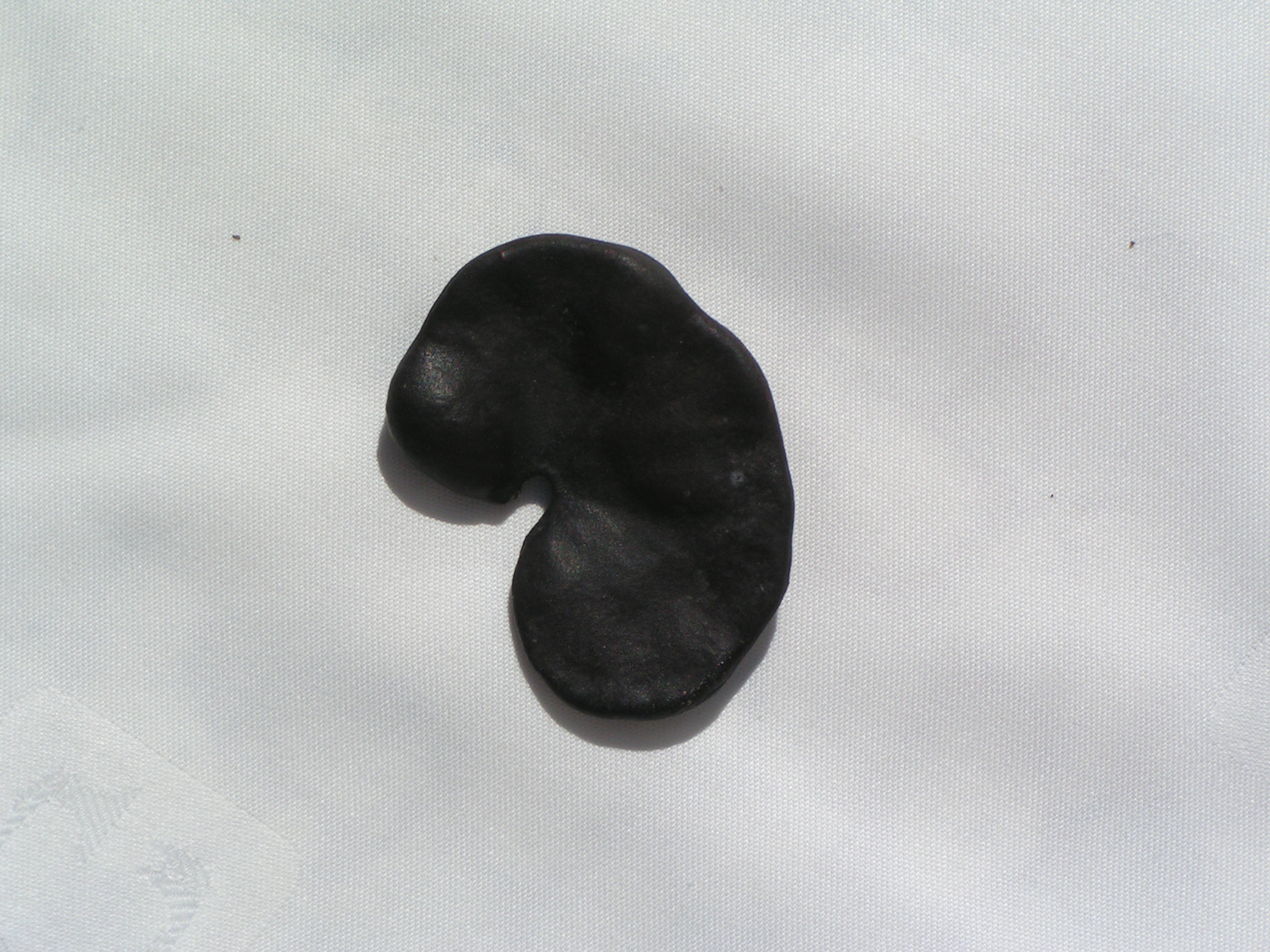 Fruto maduro de timbó (Enterolobium contortisiliquum). A su forma se debe el nombre vernáculo oreja de negro